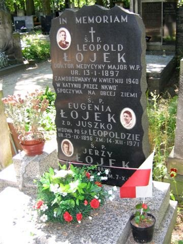 Jerzy Łojek's monument (Powązki Cemetery)